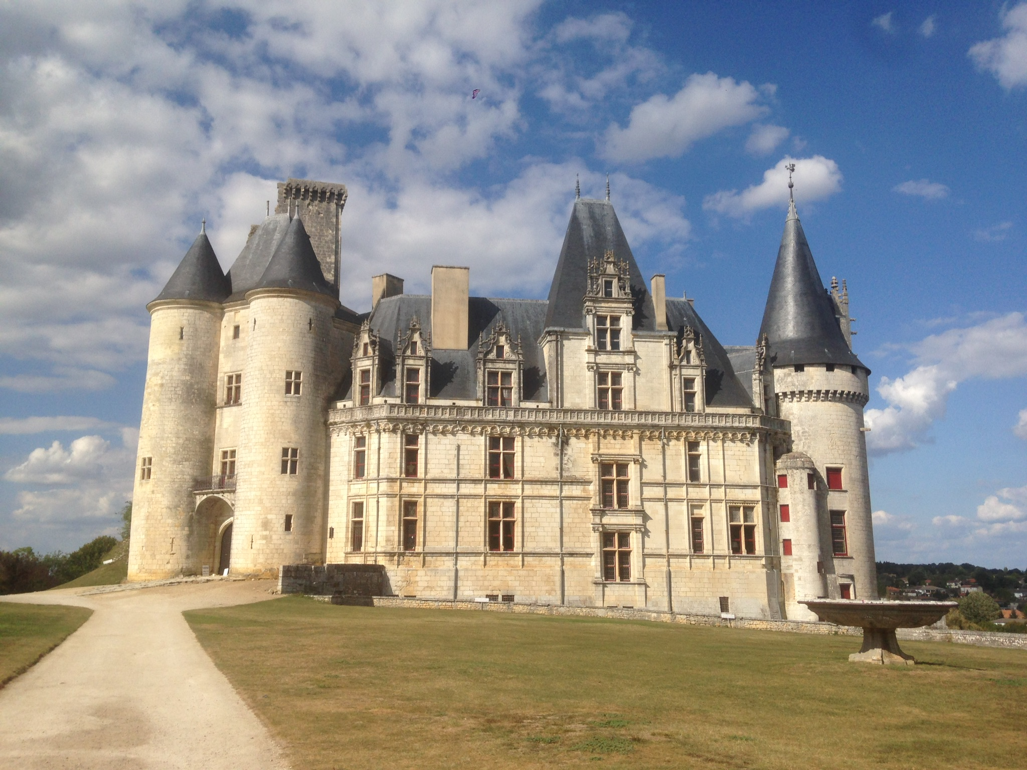 Château de La Rochefoucauld .